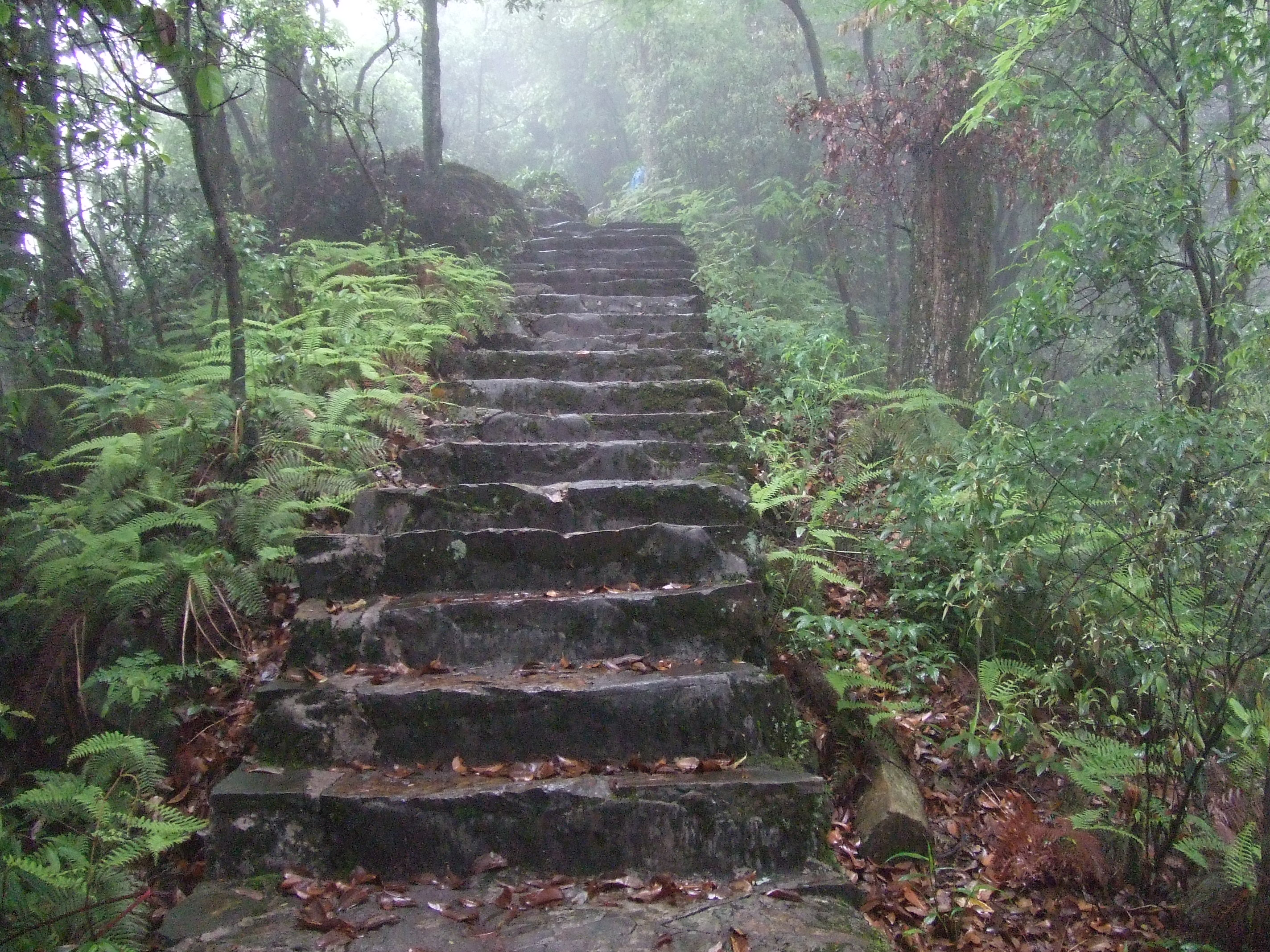 贵州-梵净山-3000梯登山路景